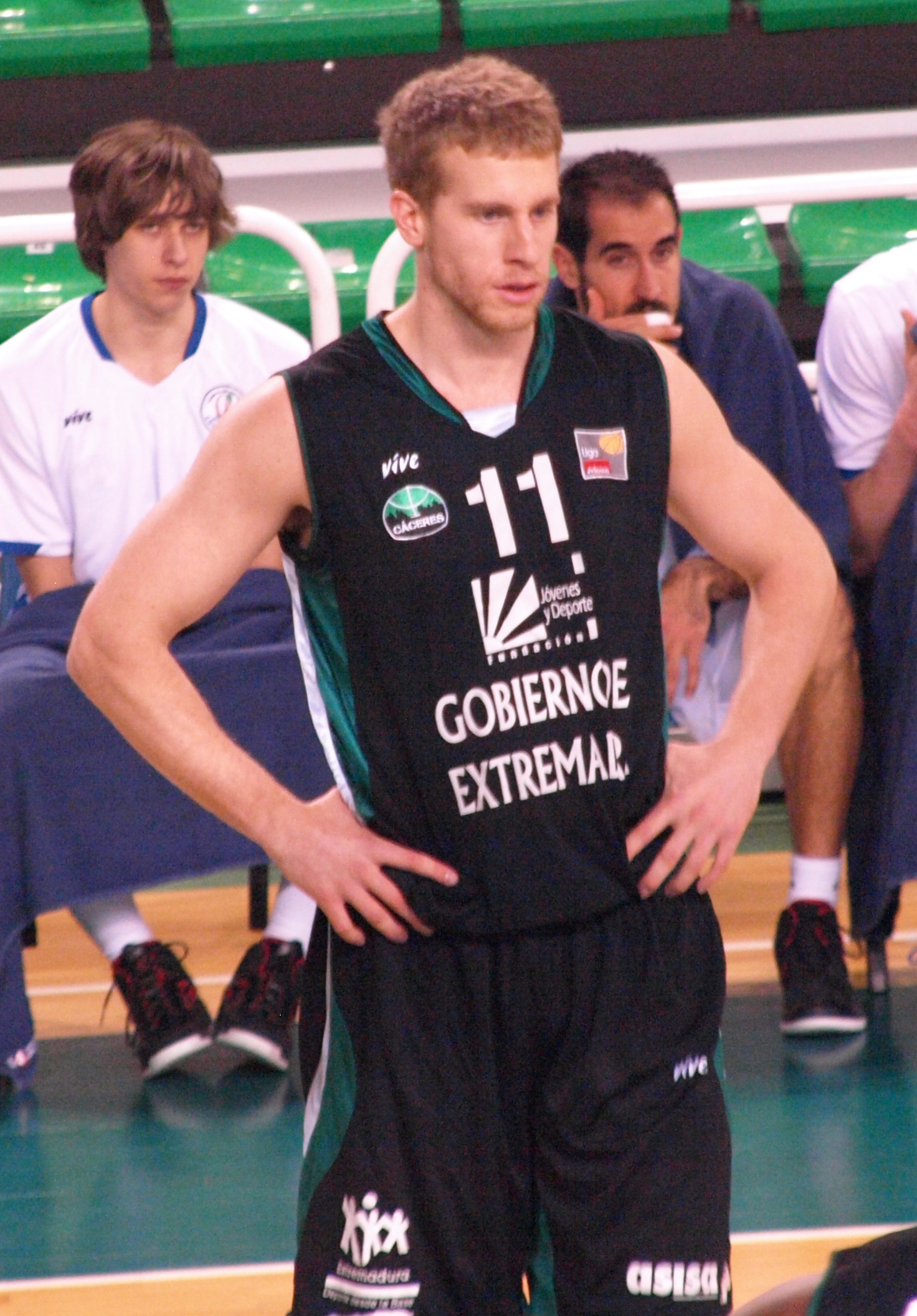 El jugador australiano de baloncesto Josh Duinker en un partido con su club, el Cáceres Ciudad del Baloncesto, en enero de 2013